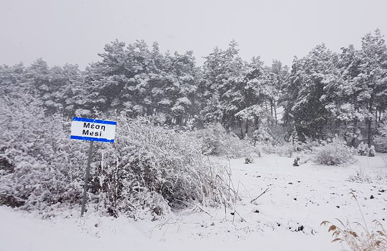 μεση ροδοπη